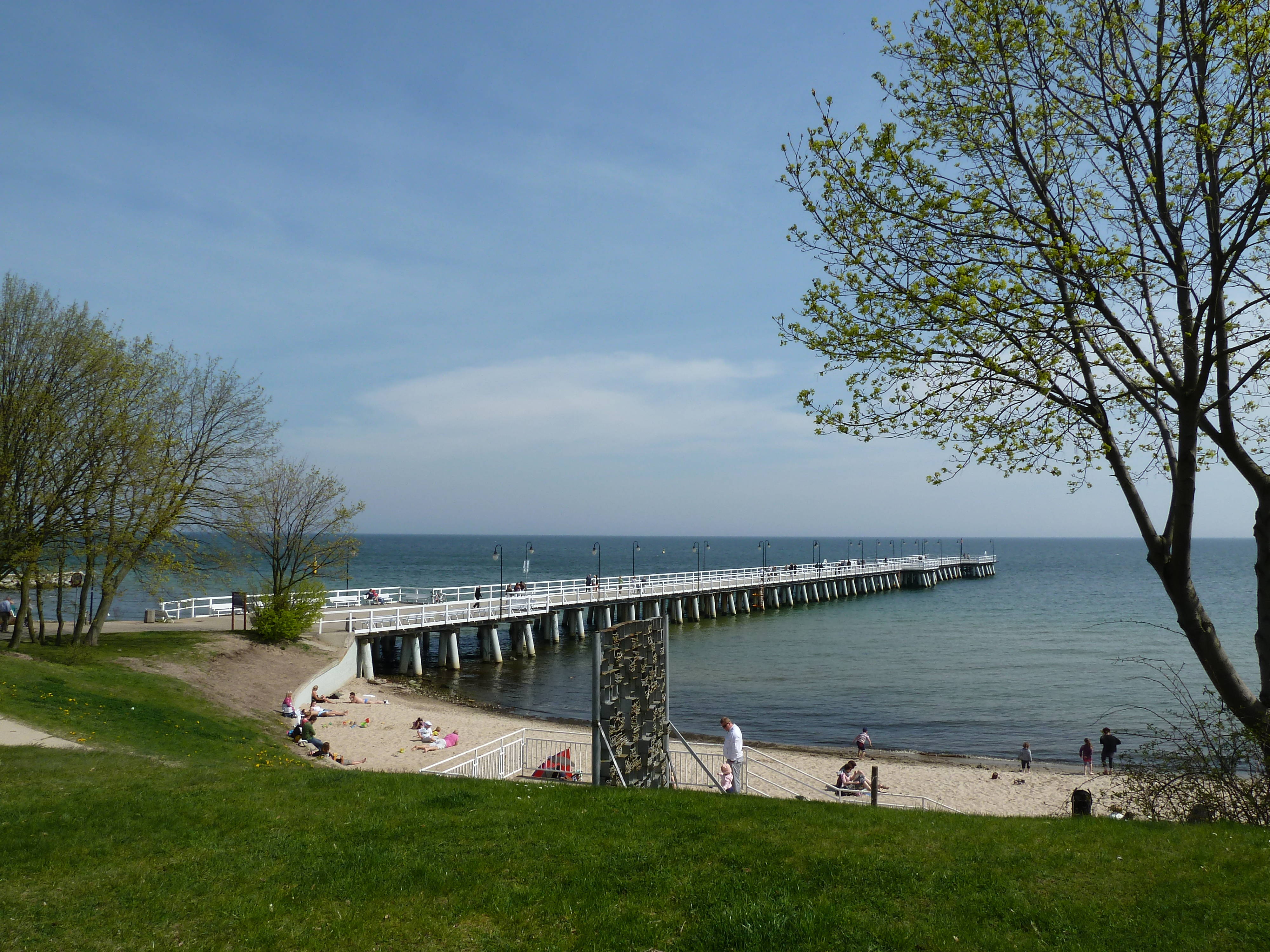 Zespół ruralistyczno-kuracyjny Orłowo w Gdyni (obszar osady rybackiej z terenem zespołu młyńskiego, terenem pensjonatu Jana Adlera oraz terenem zespołu kuracyjnego u ujścia rzeki Kaczej) Gdynia-Orłowo, Gdynia